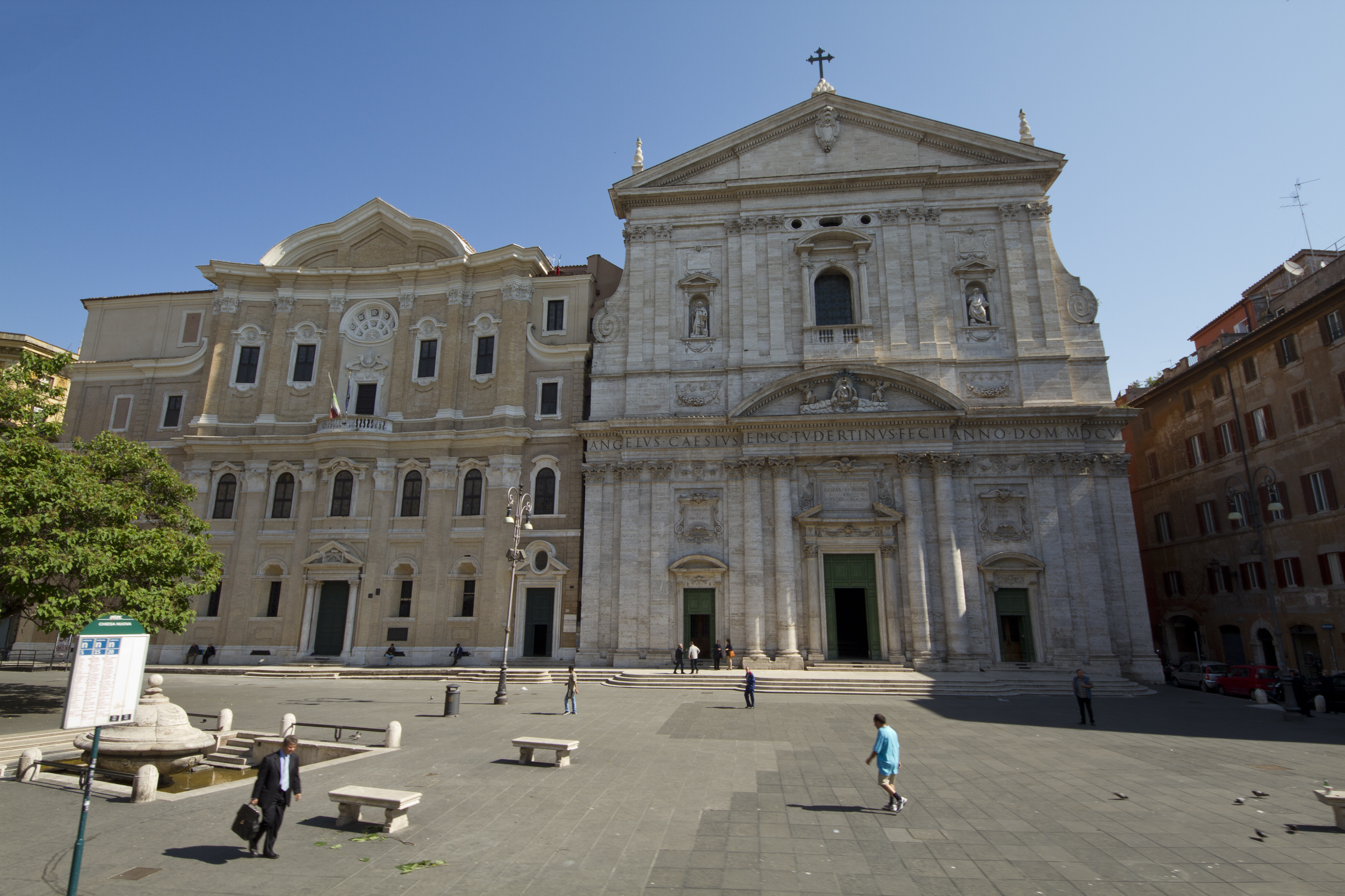 Santa Maria in Vallicella